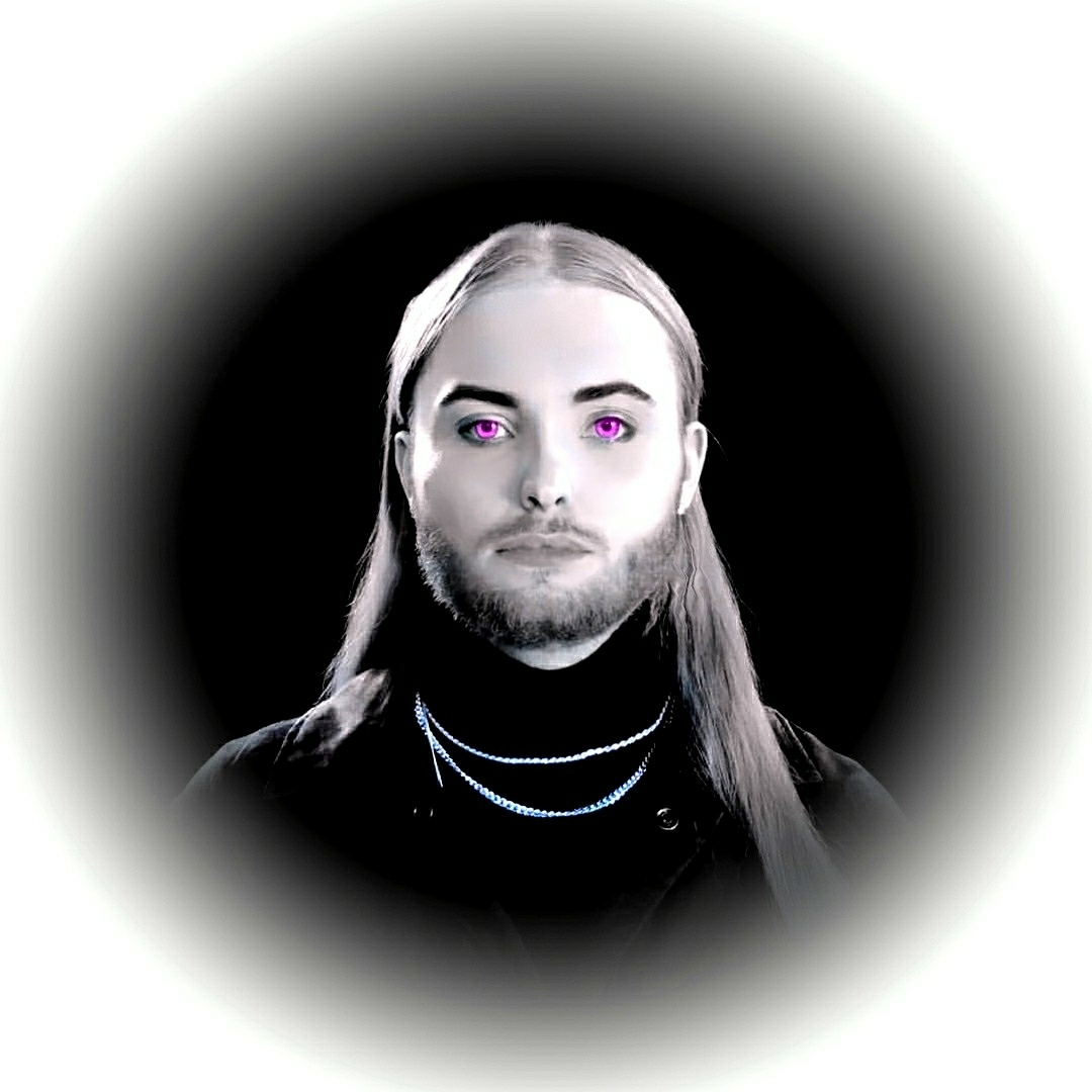 Donnie